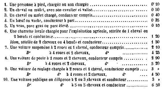 Droits de péage du pont supendu de Cubzac